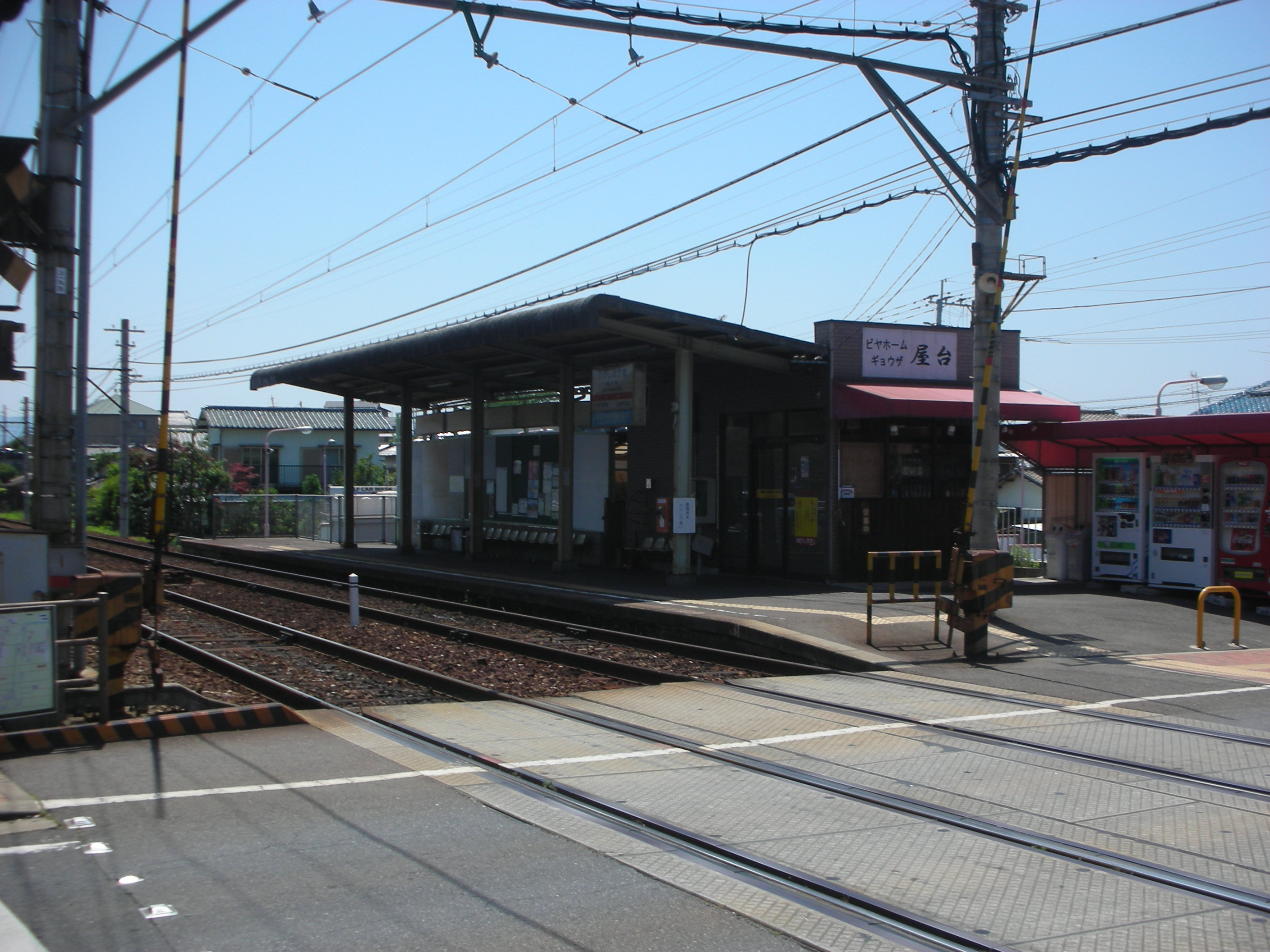 2009/6/16におんさき自身が撮影。福岡県中間市、筑豊電鉄・東中間駅